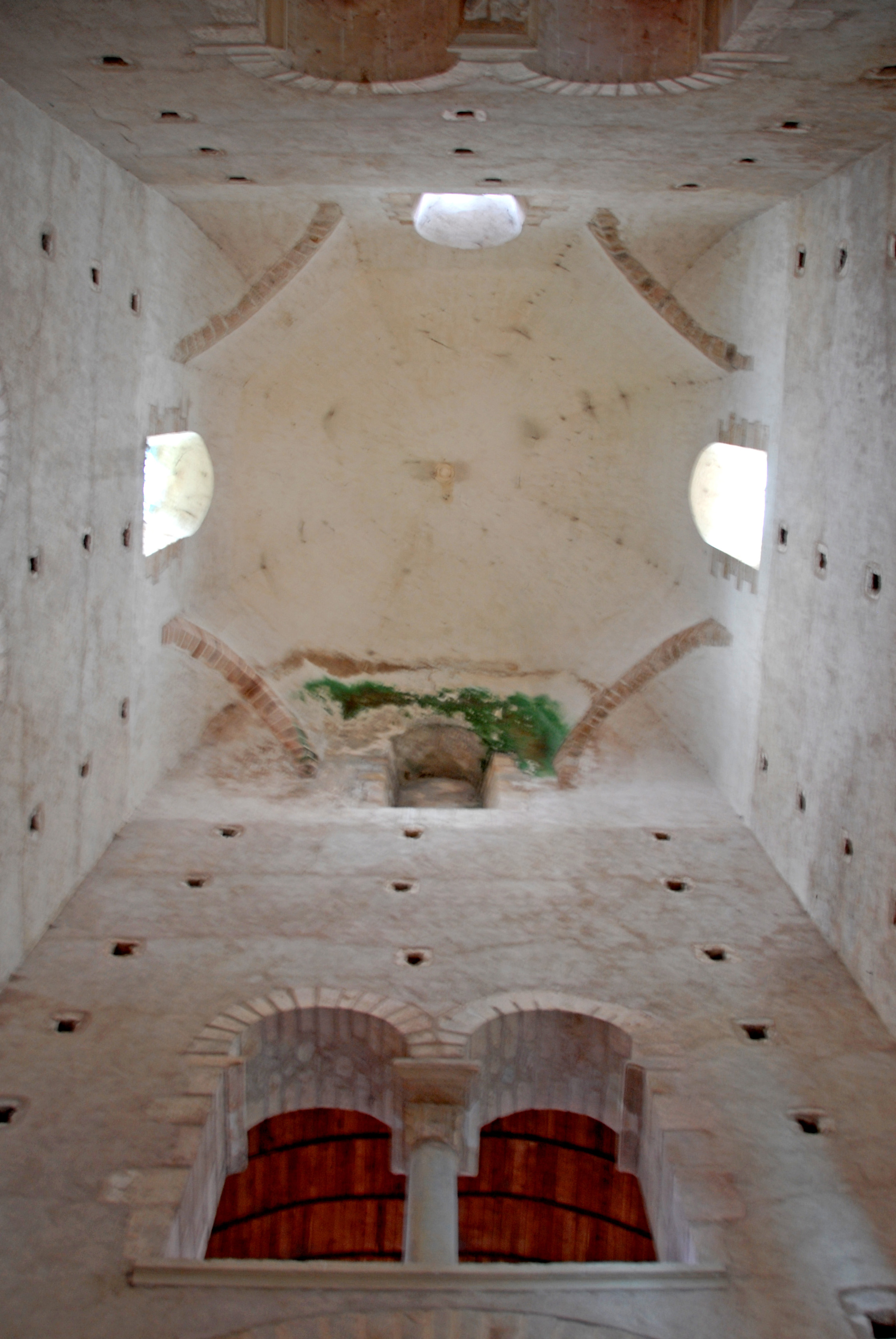 Prioratskirche, Vierungskuppel mit Tambour